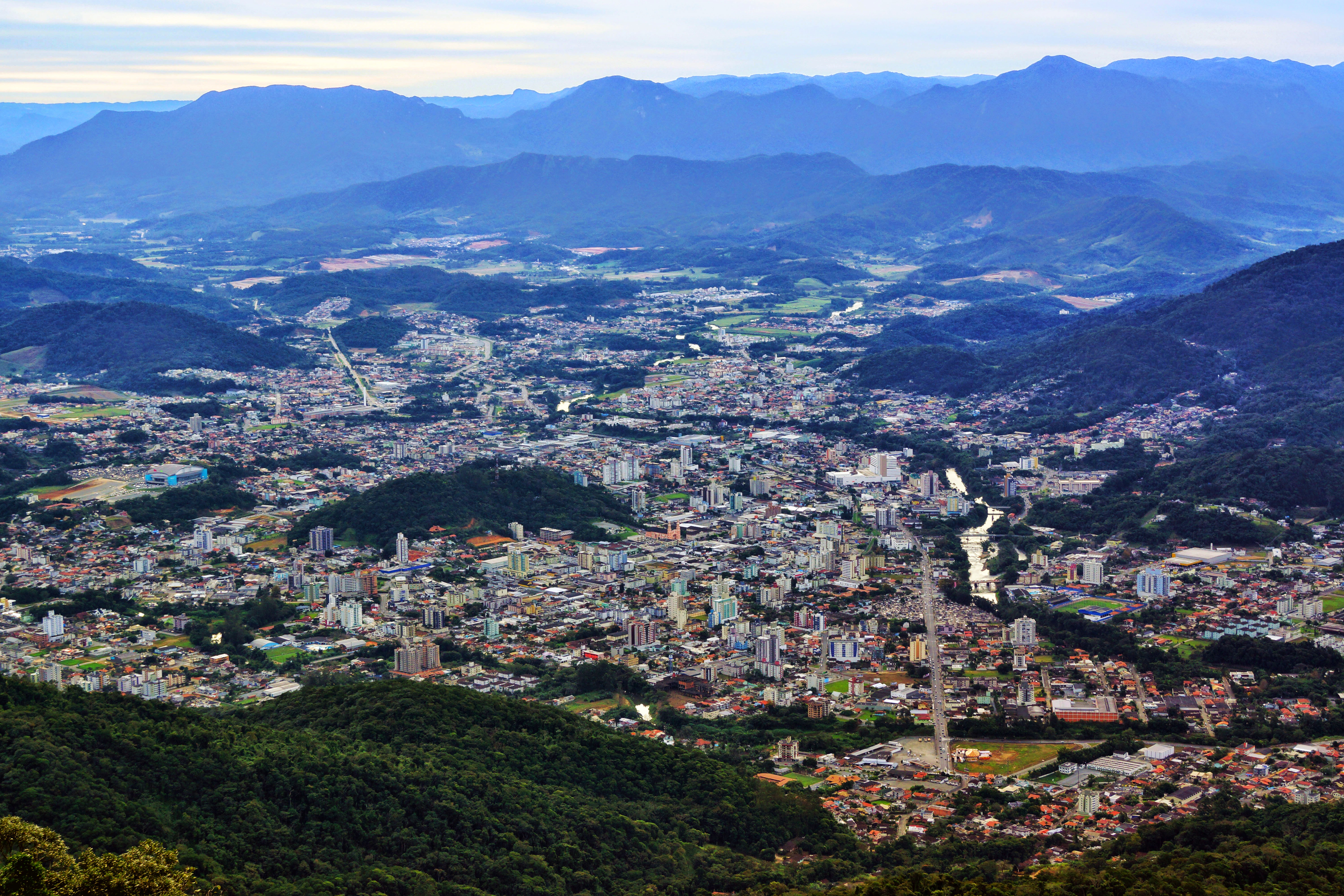 Jaraguá do Sul vista do Morro da Antena (Morro Boa Vista)